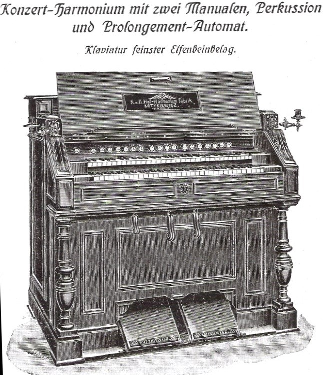 Konzertharmonium (Druckwind) der Wiener Harmoniumfabrik Kotykiewicz, "mit zwei Manualen, Perkussion und Prologement-Automat."